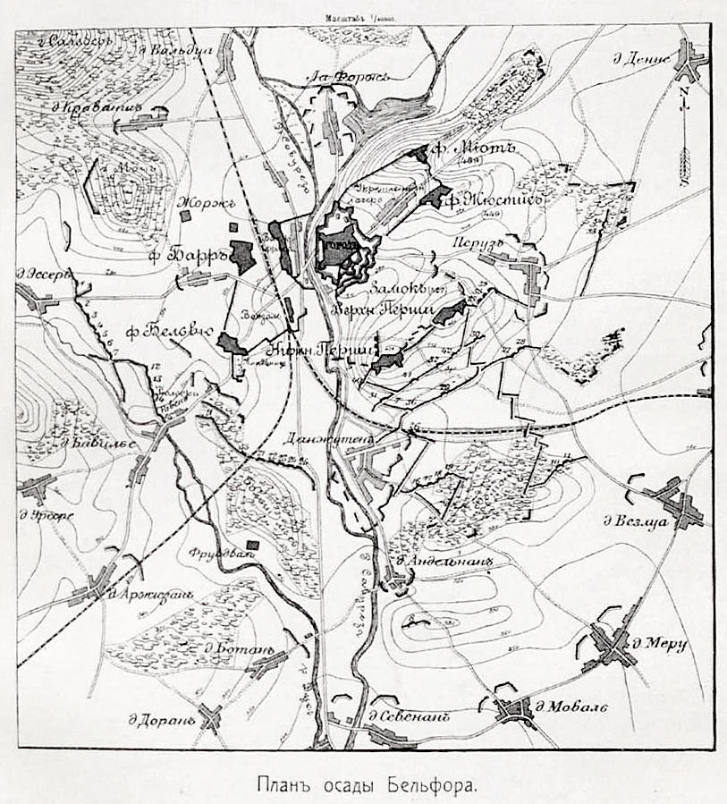 Данное изображение было использовано в статье «Бельфор» опубликованной в четвёртом томе «Военной энциклопедии», который был издан книгоиздательским товариществом Ивана Дмитриевича Сытина в 1911 году в столице Российской империи городе Санкт-Петербурге.